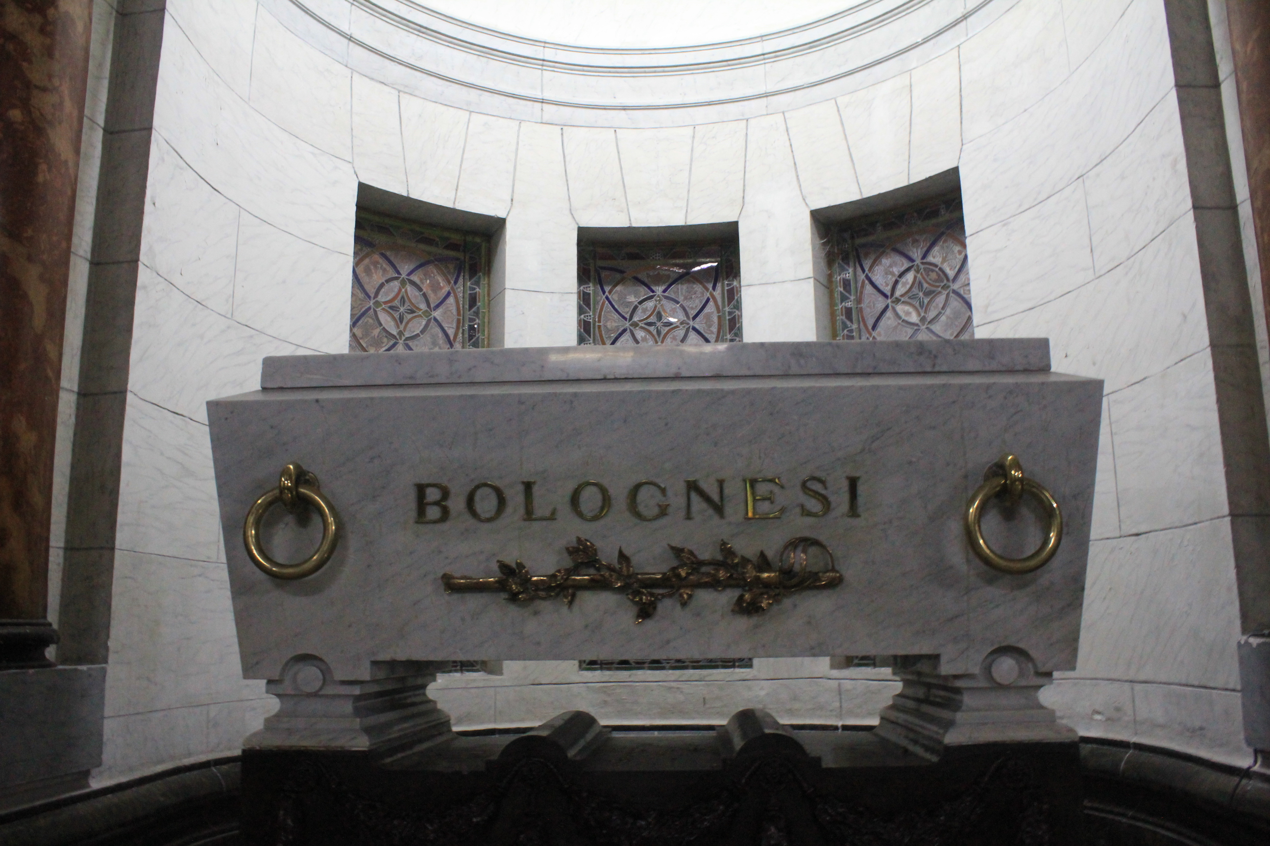 Cementerio Presbítero Maestro. Perú - Lima. Setiembre 2012